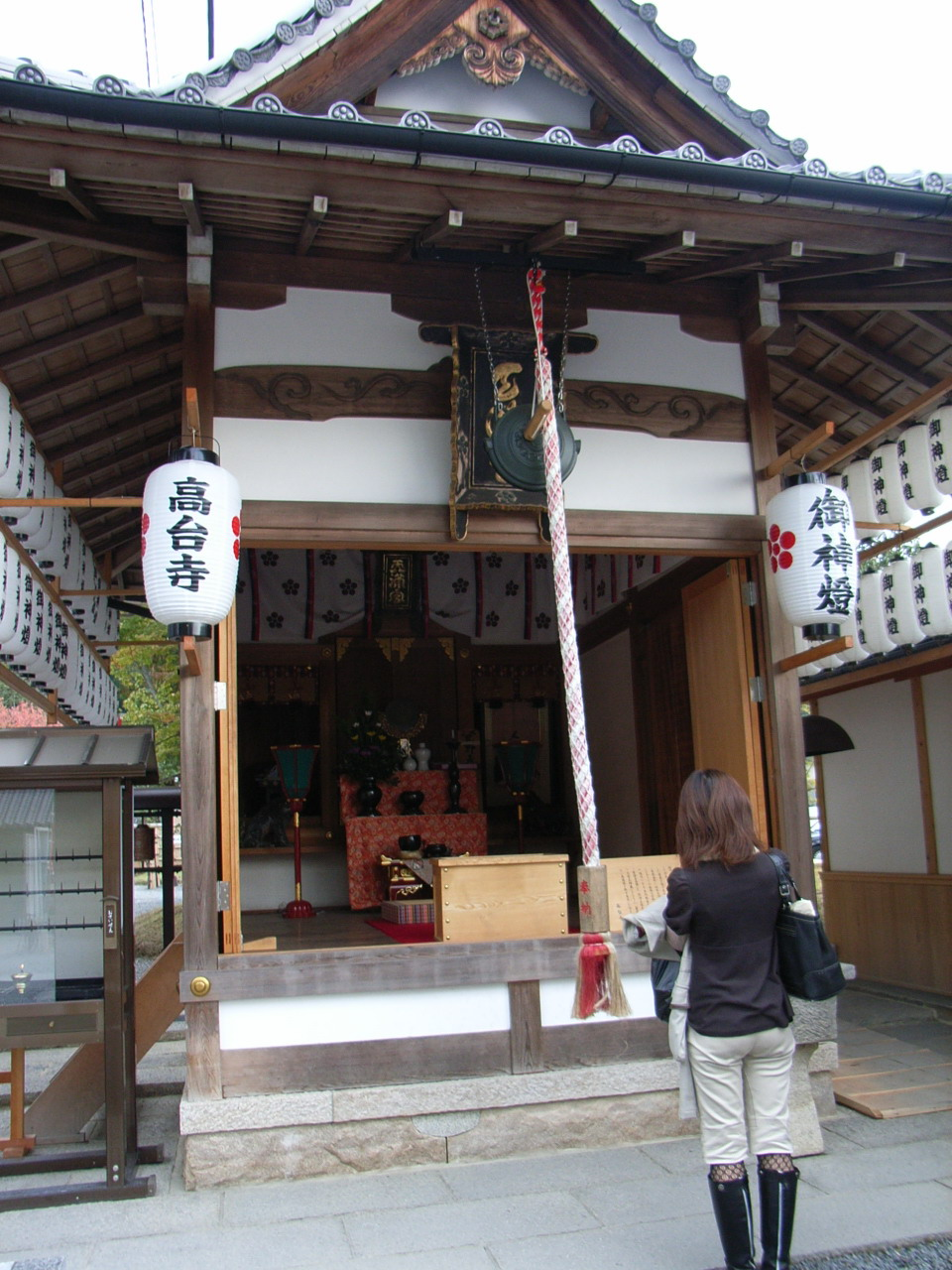 Храм Кодай-дзи Храм Кодай-дзи в Киото